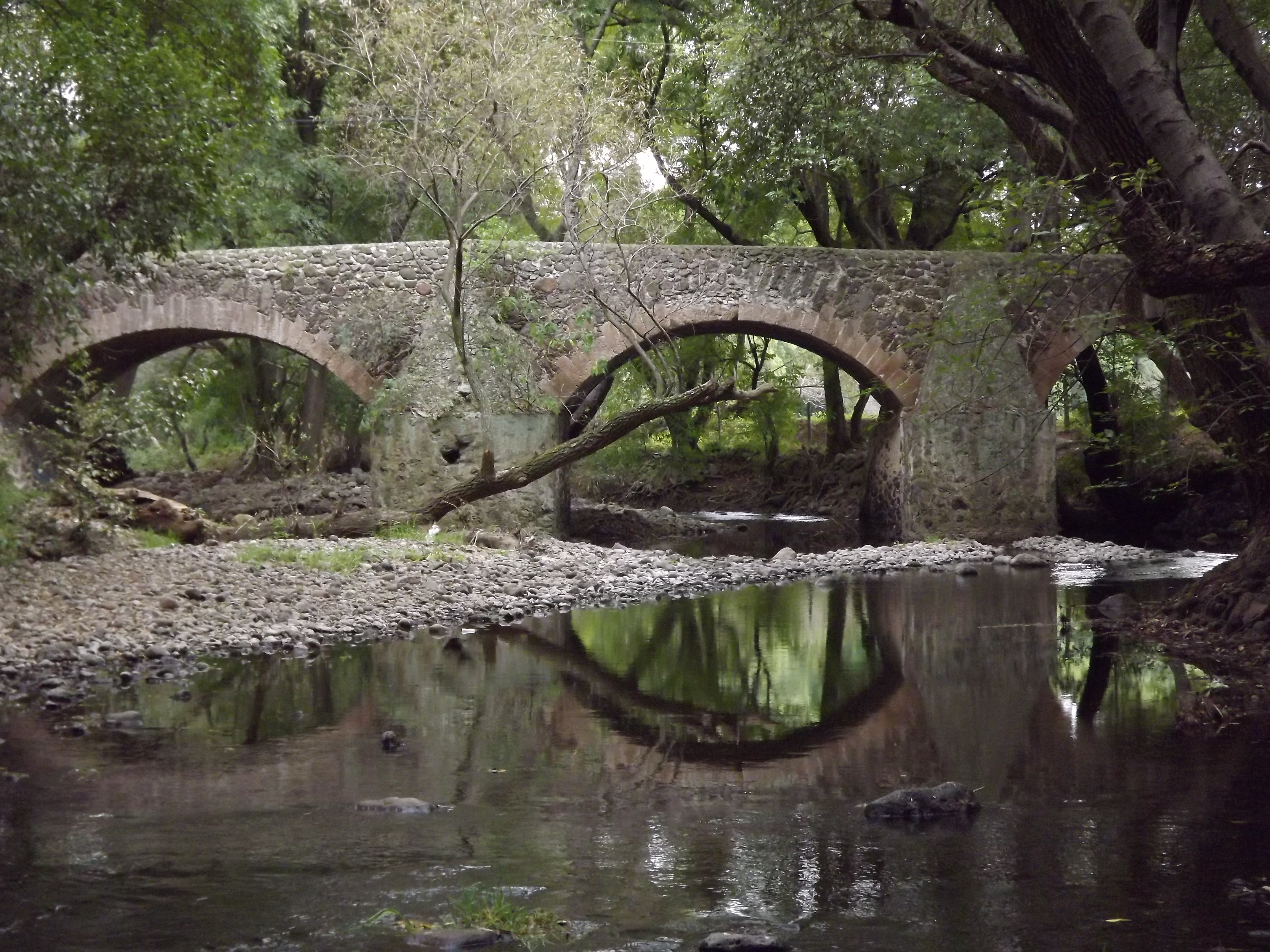 Puente de Tlautla también denominado Puente las Animas, localizado en Santiago Tlautla, municipio de Tepeji del Río de Ocampo, Hidalgo; este puente forma parte del “Tramo del Camino Real entre el puente de La Colmena y la antigua Hacienda de La Cañada” uno de los sesenta sitios declarados Patrimonio de la Humanidad bajo la denominación de el Camino Real de Tierra Adentro.